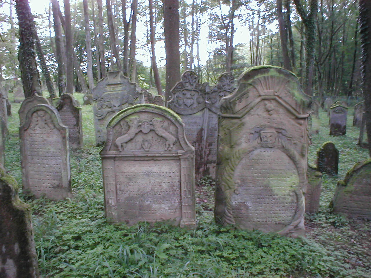 Historische Grabsteine auf dem Judenfriedhof in Heinsheim, angelegt im 16. Jhd.